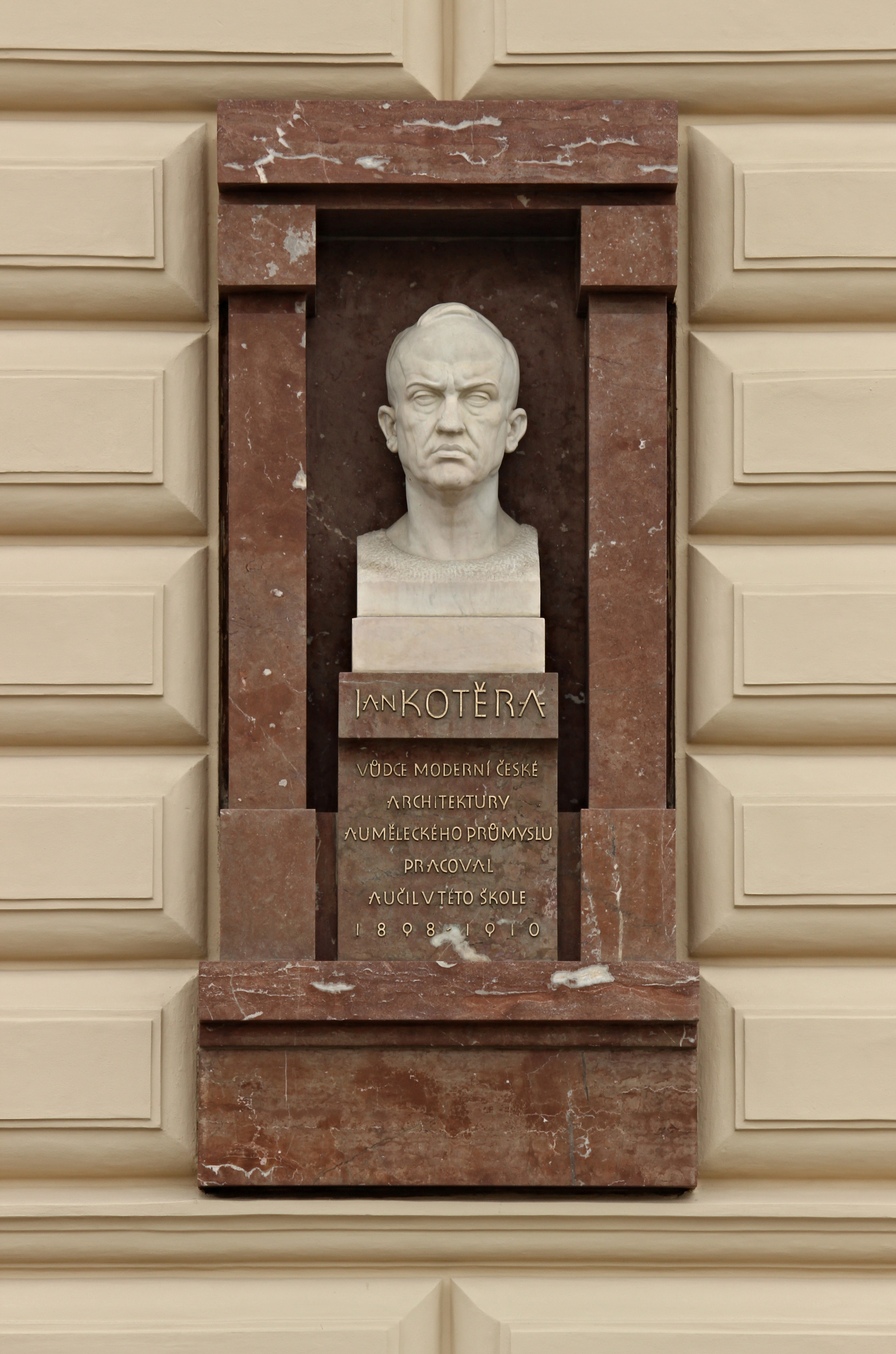 Bohumil Kafka: Busta architekta a učitele Jana Kotěry, budova VŠUP, Praha 1-Staré Město, č. p. 80, náměstí Jana Palacha 3, deska osazena v roce 1924; text: "Jan Kotěra vůdce moderní české architektury a uměleckého průmyslu pracoval a učil v této škole 1893-1910"